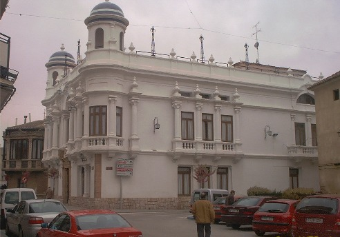 Edificio del Circulo Mercantil e Industrial de Villarrobledo, de estilo modernista. Reedificado en 1932 sobre un Pósito del siglo XVII.